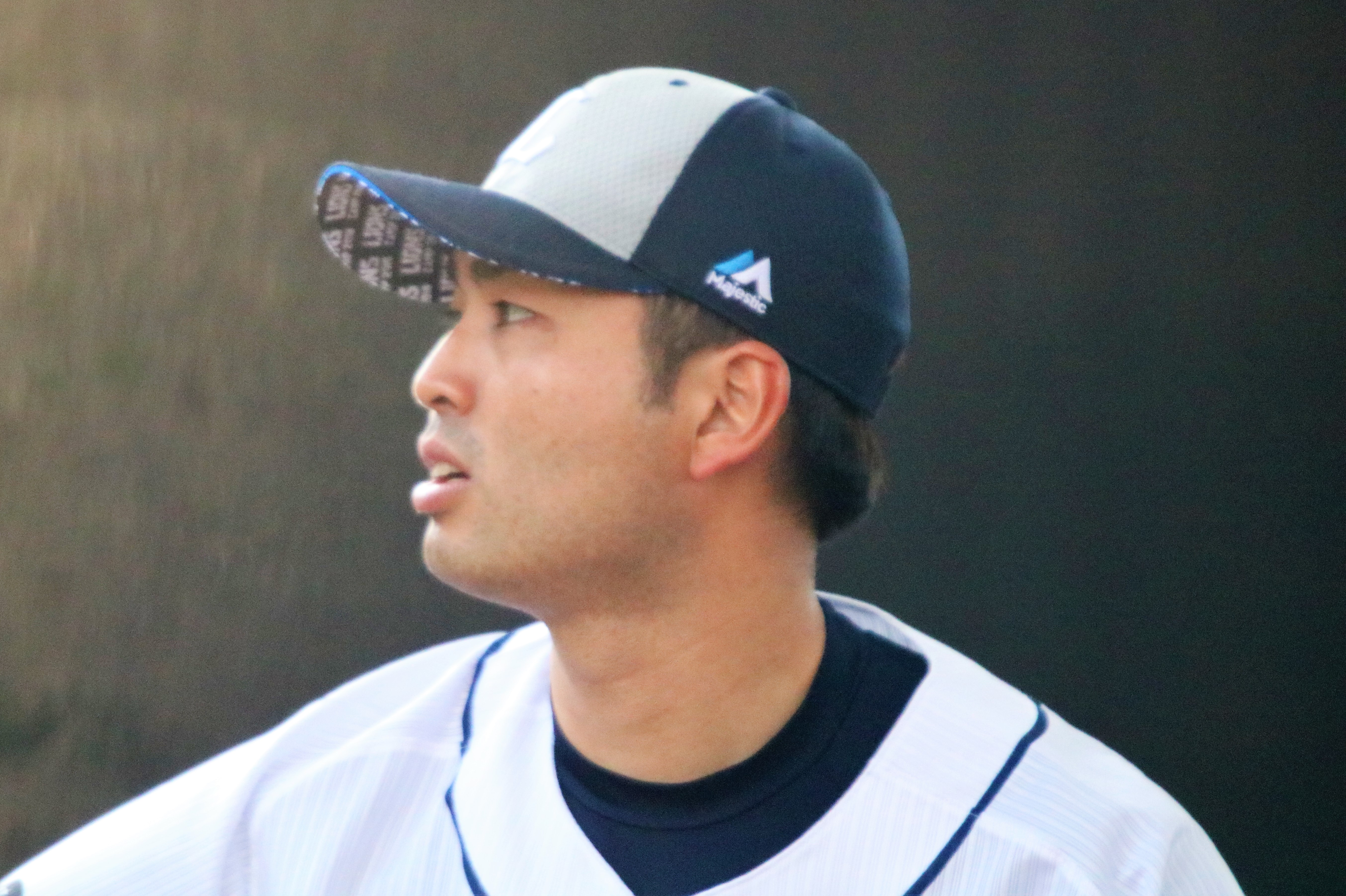 2018/2/9 宮崎・南郷キャンプ